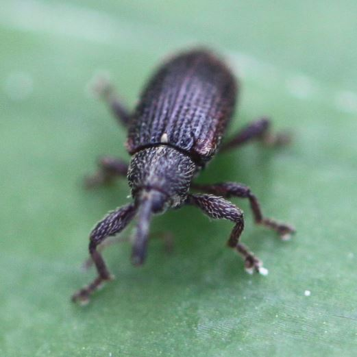 Rüsselkäfer Bradybatus kellneri am 17. April 2019 in einem Wald nahe Walldorf/Baden